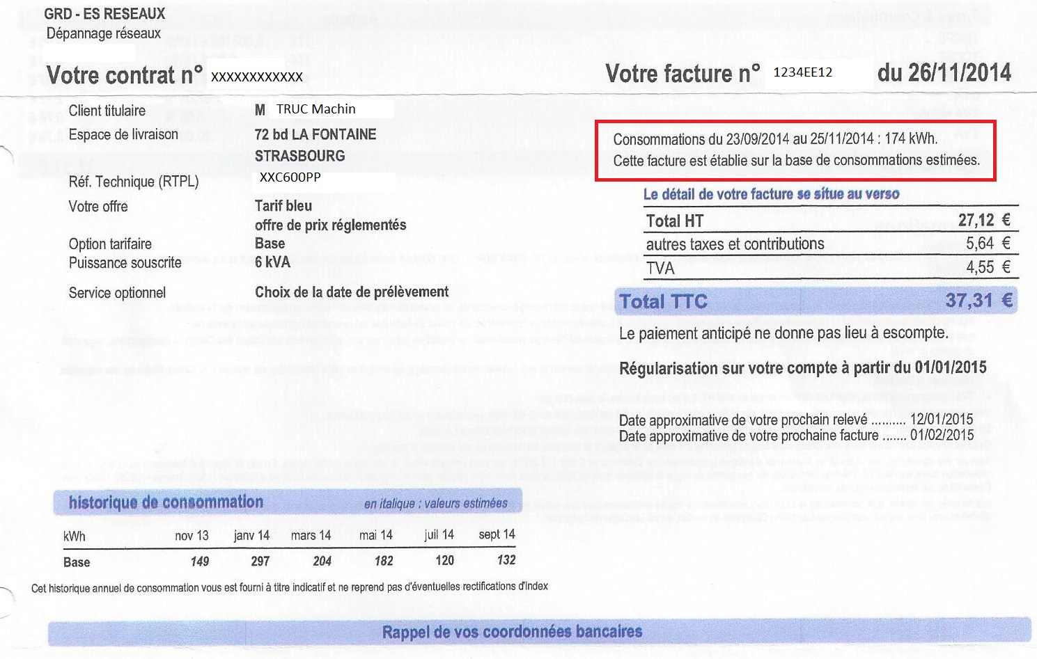 Exemple de facture d'électricité à Strasbourg